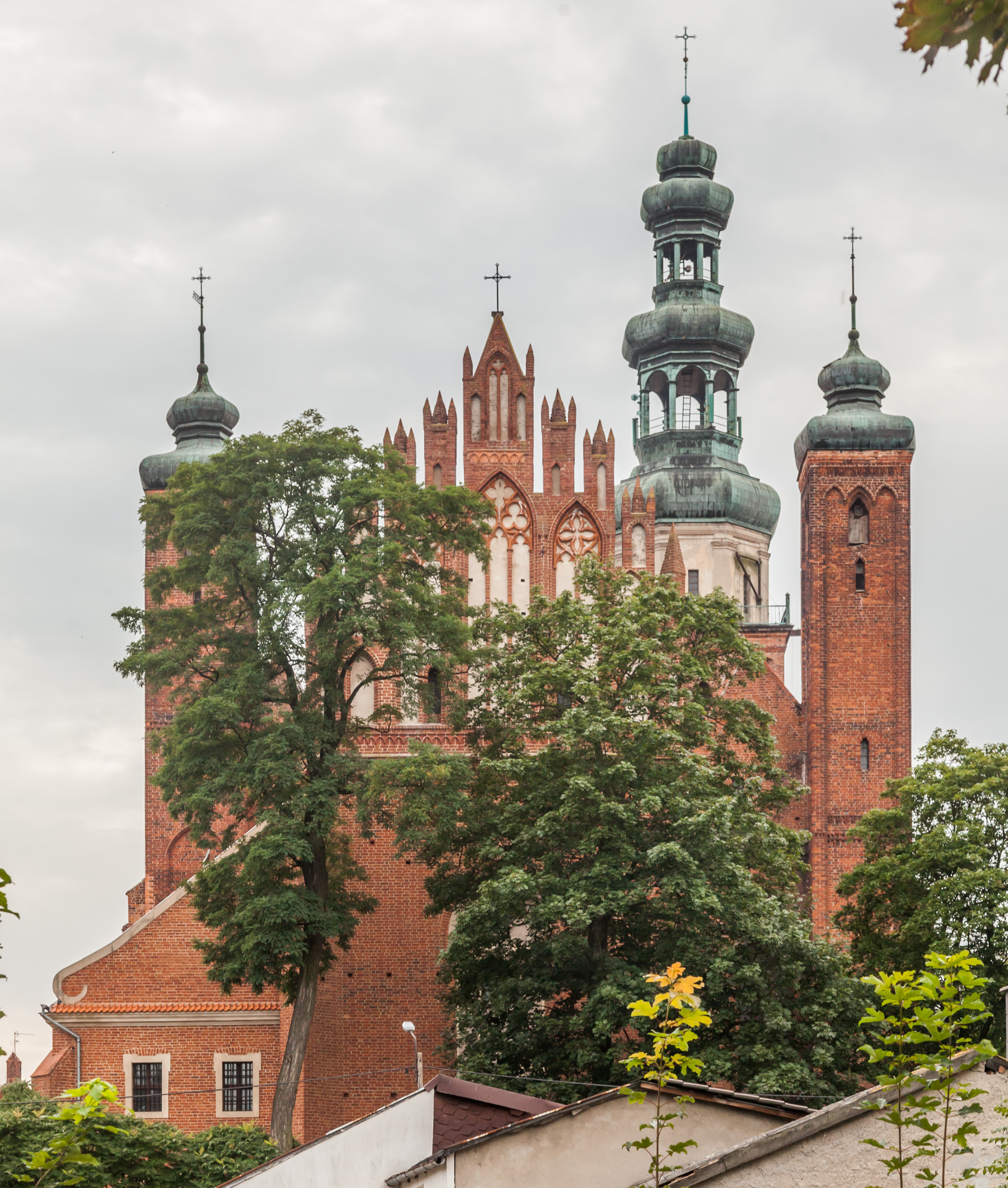 Katedra w Chełmży.